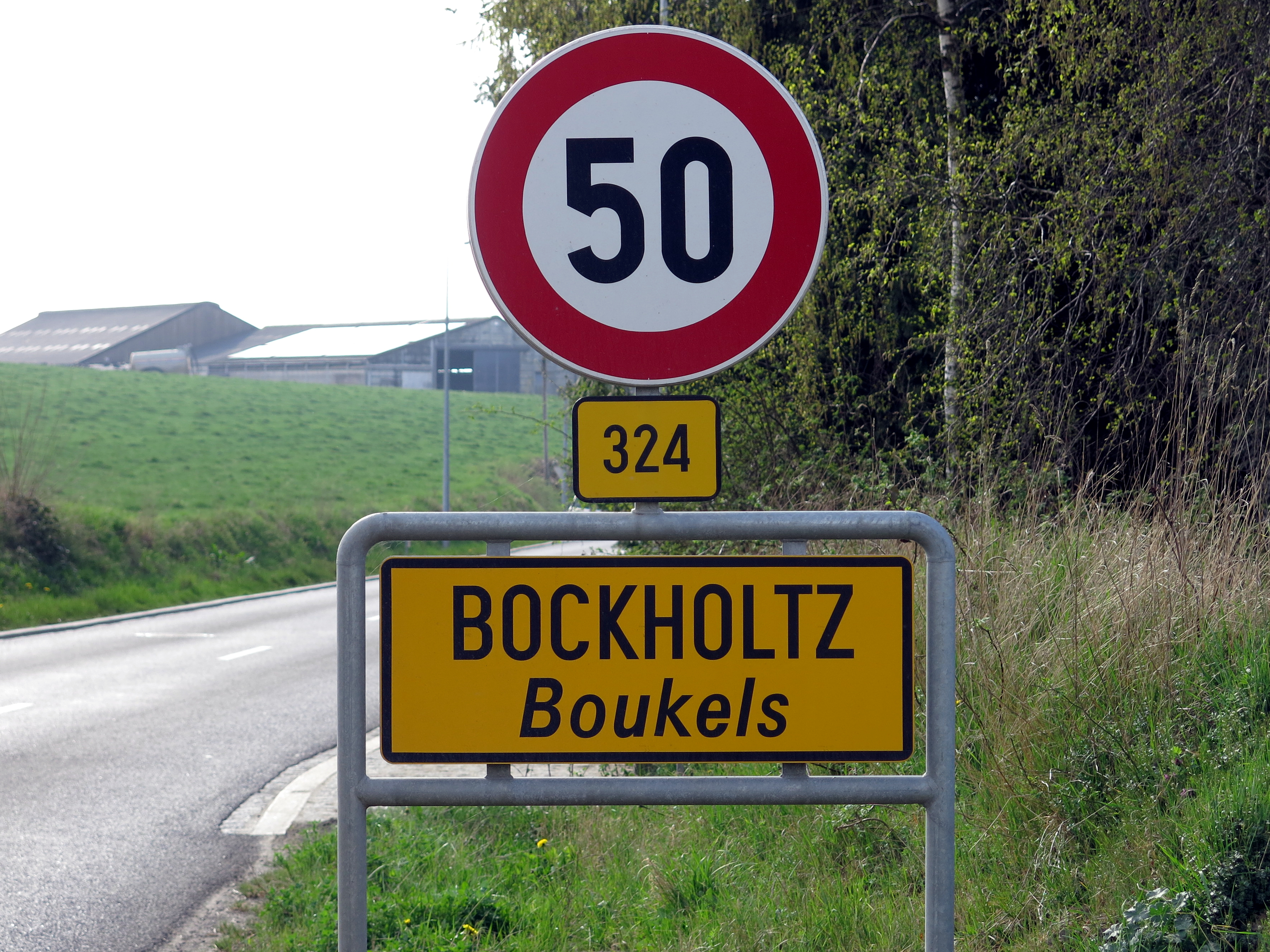 D'Entree vu Buckels.